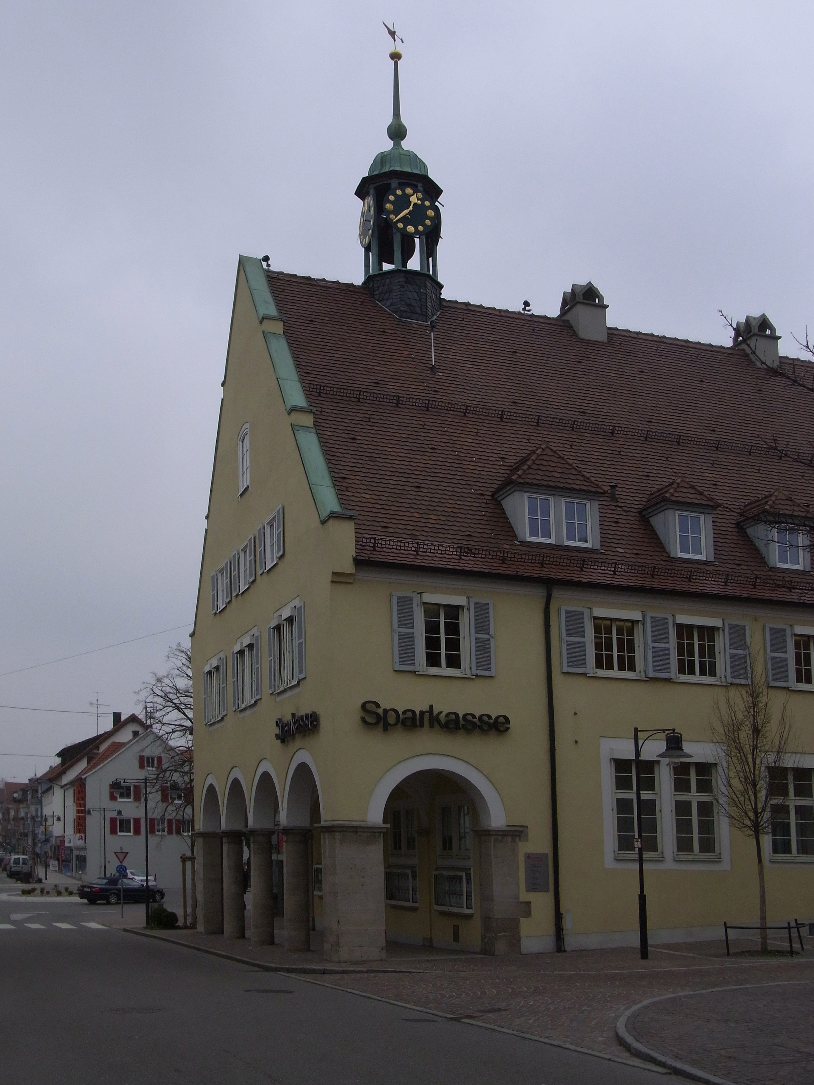 Balingen Sparkasse Zollernalb Altes Sparkassengebäude